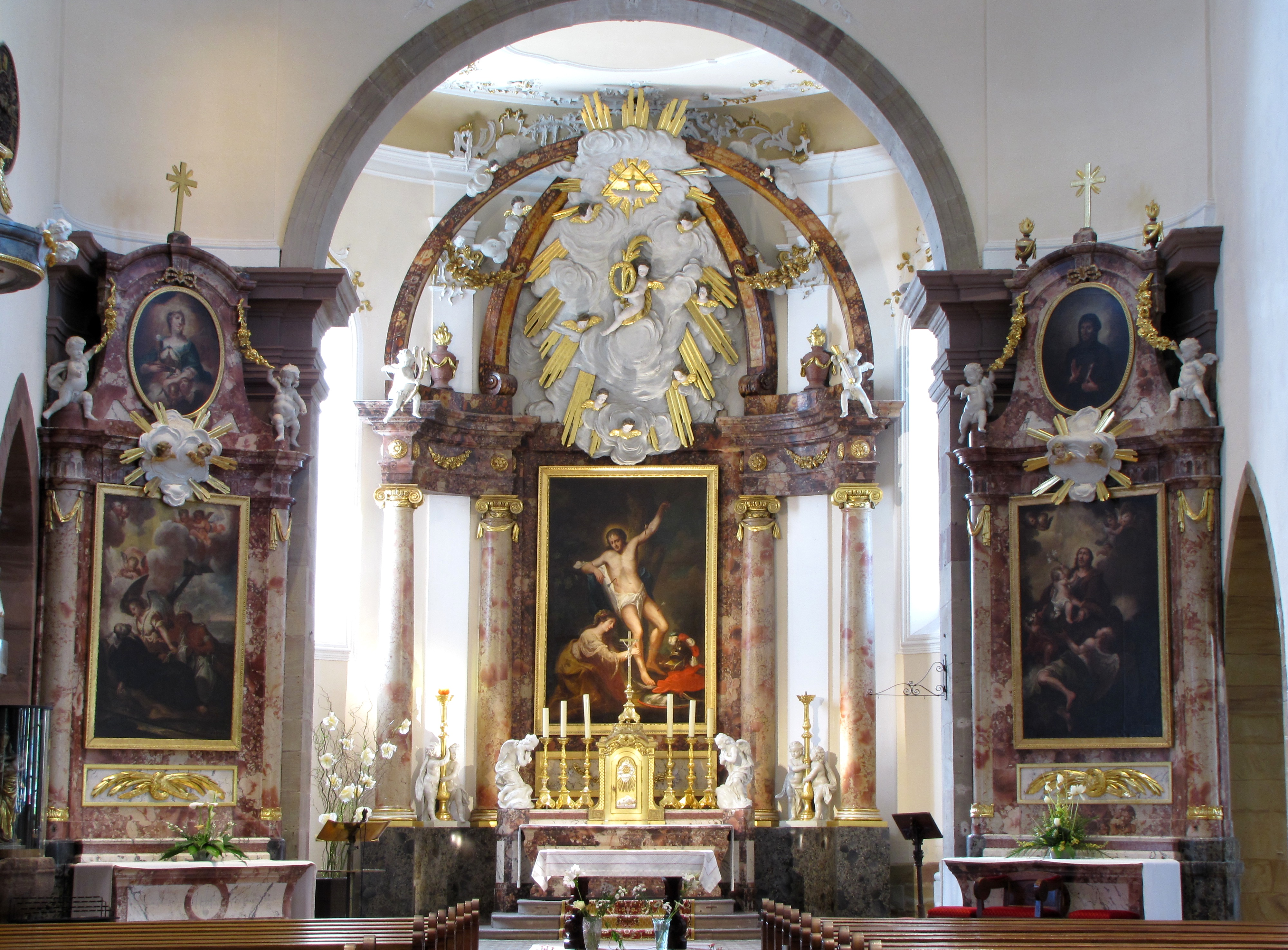 Alsace, Haut-Rhin, Église Saint-Sébastien de Soultzmatt (PA00085689, IA68004357): Vue sur les autels secondaires et le maître-autel (XVIIIe). Autel secondaire de Saint-François-Xavier avec tableau (1777): This object is classé Monument Historique in the base Palissy, database of the French furniture patrimony of the French ministry of culture, under the references PM68000352, IM68007648 and tableaux IM68007647 tableaux. Maître-autel (1777): This object is classé Monument Historique in the base Palissy, database of the French furniture patrimony of the French ministry of culture, under the references PM68000351, IM68007645 and tableau IM68007646 tableau. Autel secondaire de Saint-Joseph avec tableaux (1778): This object is classé Monument Historique in the base Palissy, database of the French furniture patrimony of the French ministry of culture, under the references PM68000353, IM68007648 and tableaux IM68007647 tableaux.